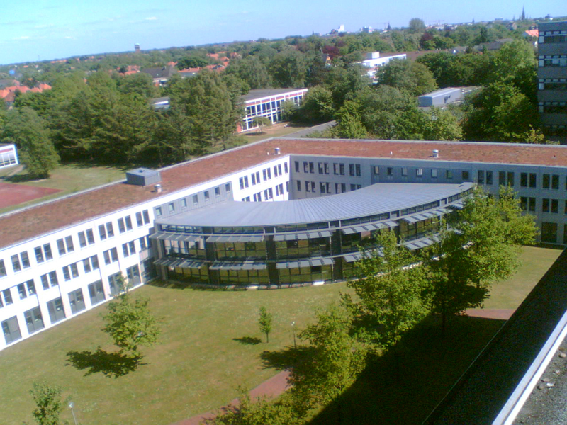 Universität Oldenburg, Blick auf Gebäude A5 vom AVZ (A1-A4) aus